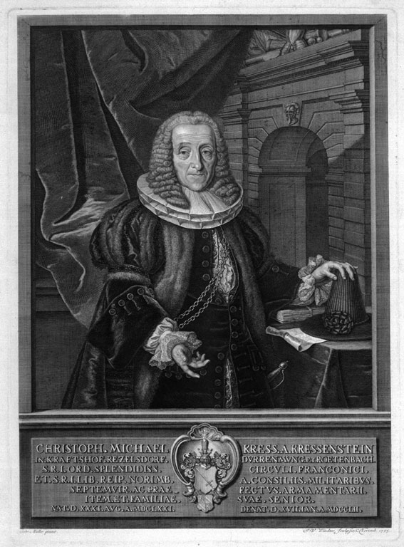 Der Nürnberger Patrizier und Politiker Christoph Michael Christoph Michael Kress von Kressenstein.jpg (1671-1752): «Christoph. Michael Kress a Kressenstein in Kraftshof, Rezelsdorf, Durrenmung et Roetenbach, S. R. I. Ord. Splendidiss. Circuli Franconici et S. R. I. Lib. Reip. Norimb. a Consiliis Militaribus Septemvir ac Praefectus Armamentarii, item et Familiae suae Senior Nat. d. XXXI. Aug. A. MDCLXXI. Denat. d. XVII. Ian. A. MDCCLII Gabr. Müller pinxit. I. W. Windter sculpsit Norimb. 1753»